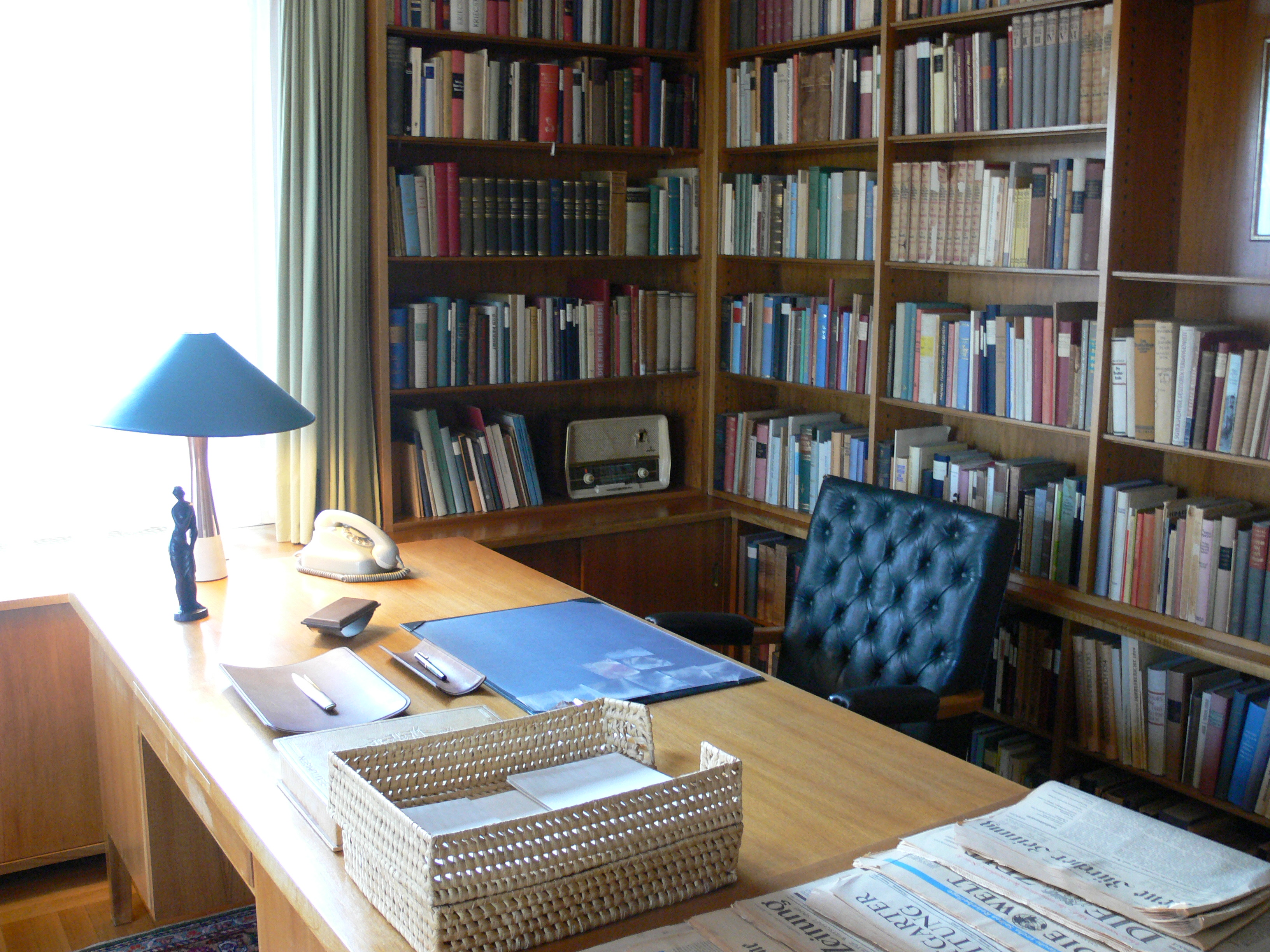 Theodor-Heuss-Haus, Feuerbacher Weg, Stuttgart-Nord Arbeitszimmer von Theodor Heuss (mit einer Auswahl seiner Bücher)